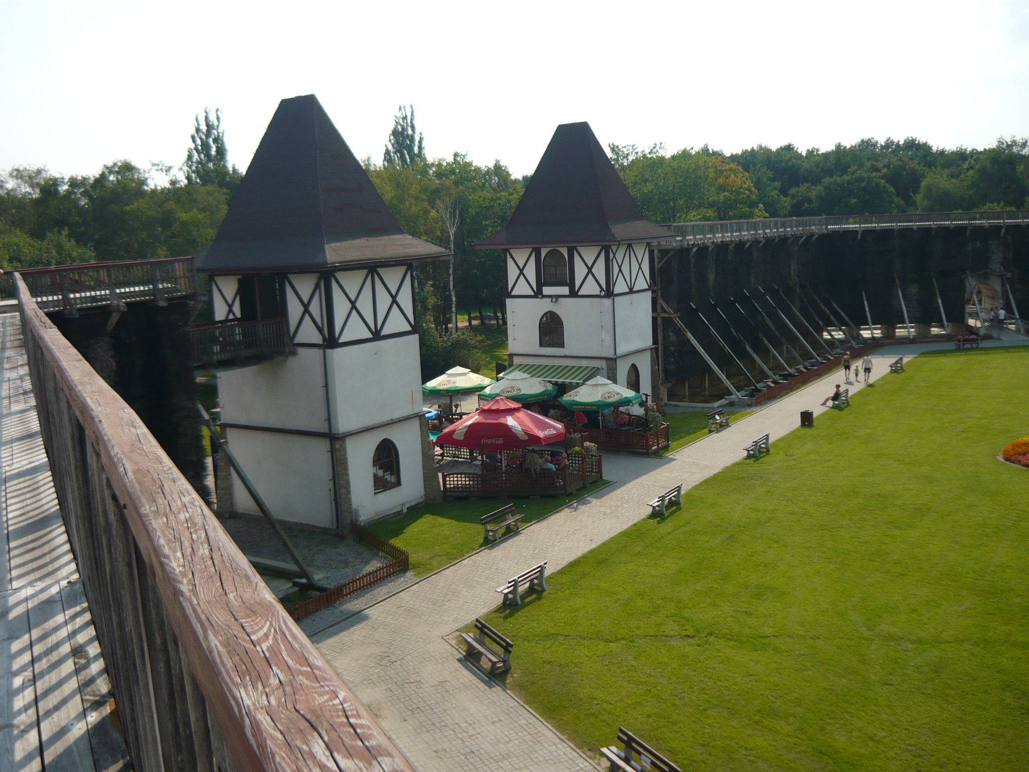 Tężnie w Inowrocławiu - lipiec 2012.